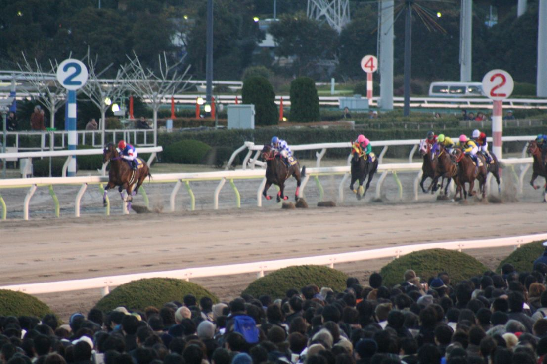 東京大賞典 最後の直線（大井競馬場にて撮影）